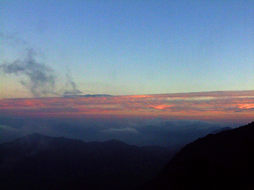 Vista do alto do morro da boa vist, Jaragua do Sul